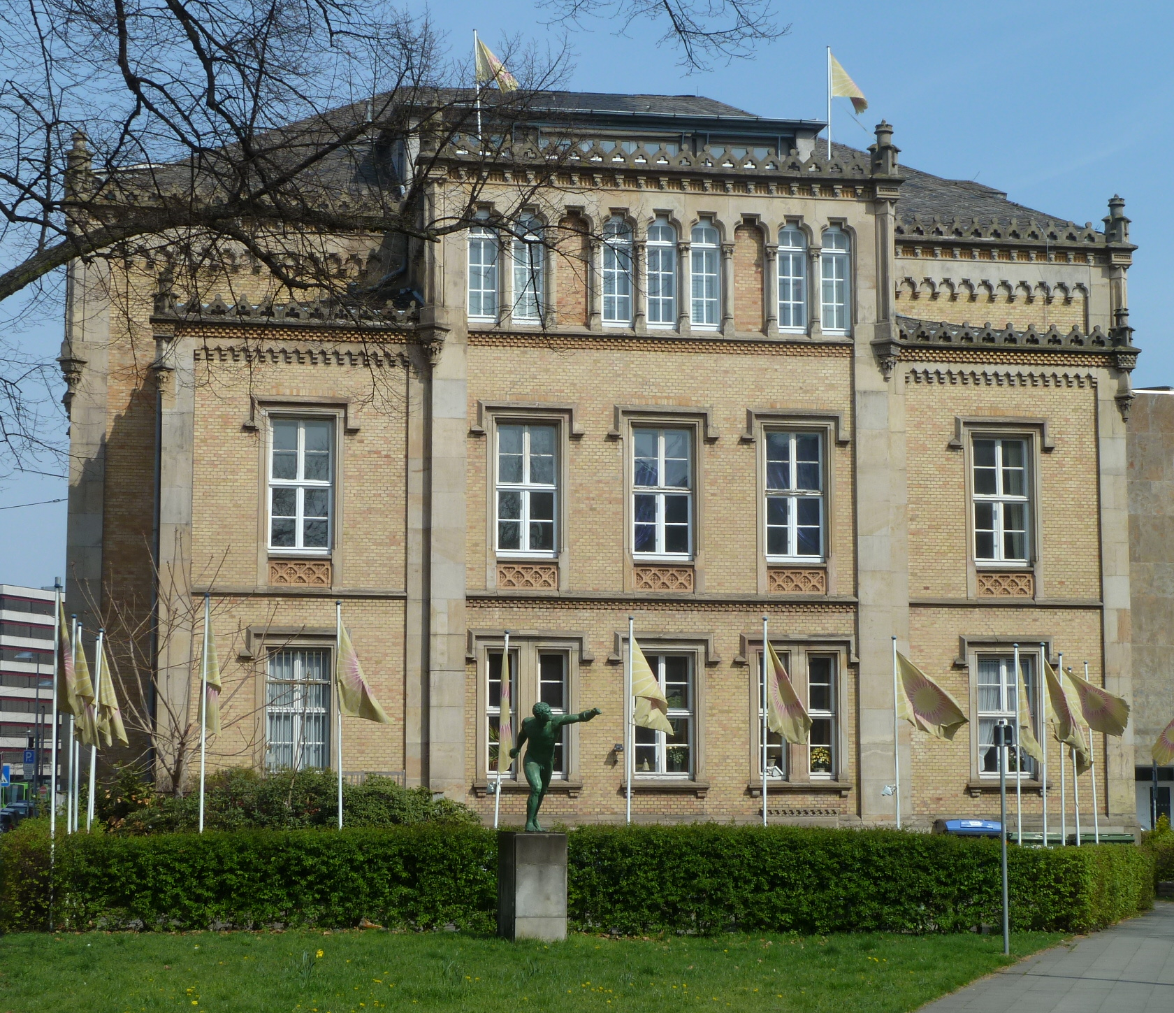 Grote-Palais, Skulptur des Fechters, Sophienstraße 7, Erbaut 1862-64 nach Plänen von Otto Goetze für Adolf Graf von Grote